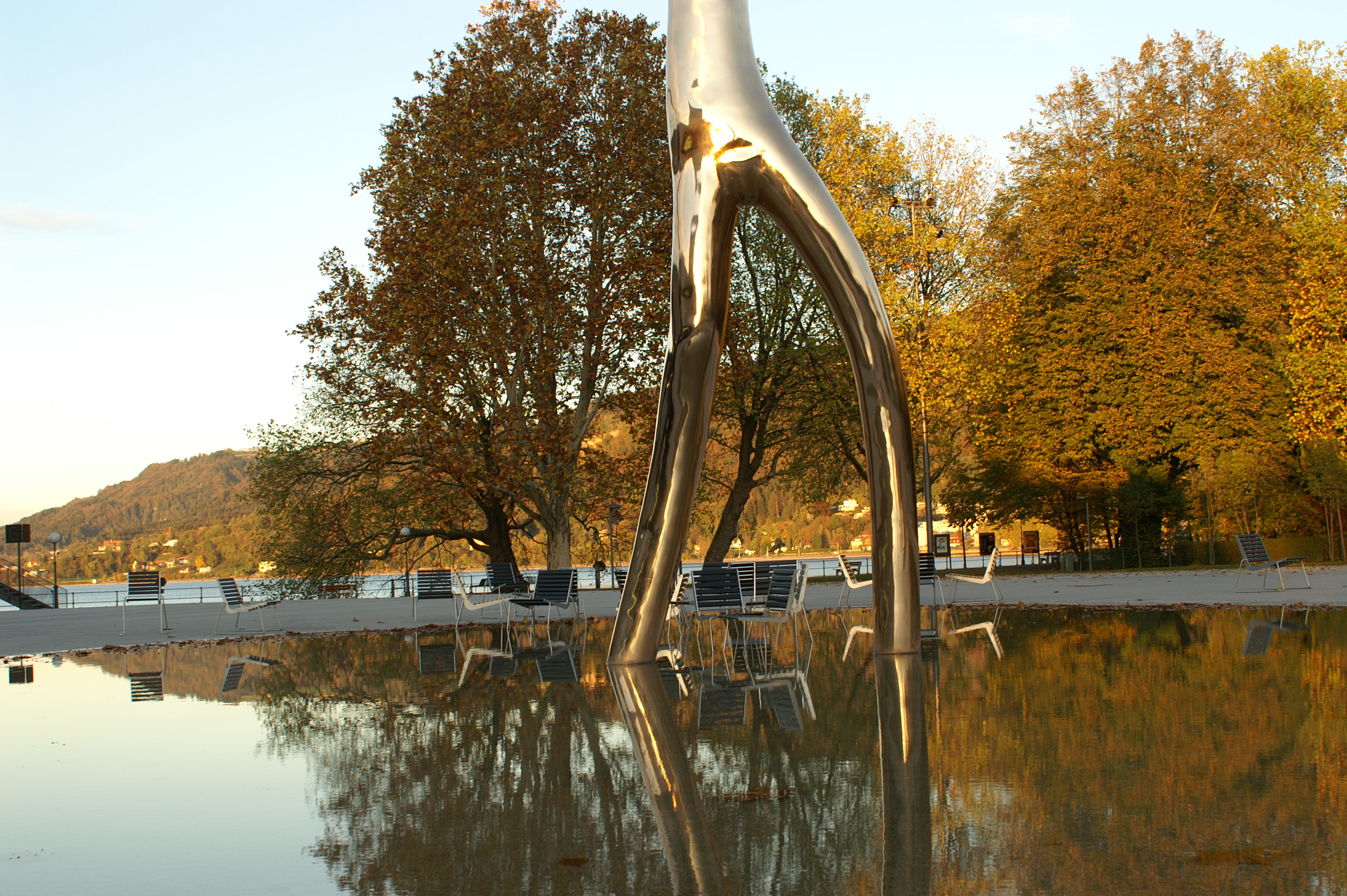 Skulptur “Ready Maid” von Gottfried Bechtold vor dem Festspielhaus Bregenz am Bodensee